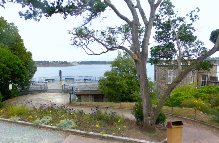 Terrasse du Musée de la mer de Dinard, au-dessus de l'estuaire de la Rance